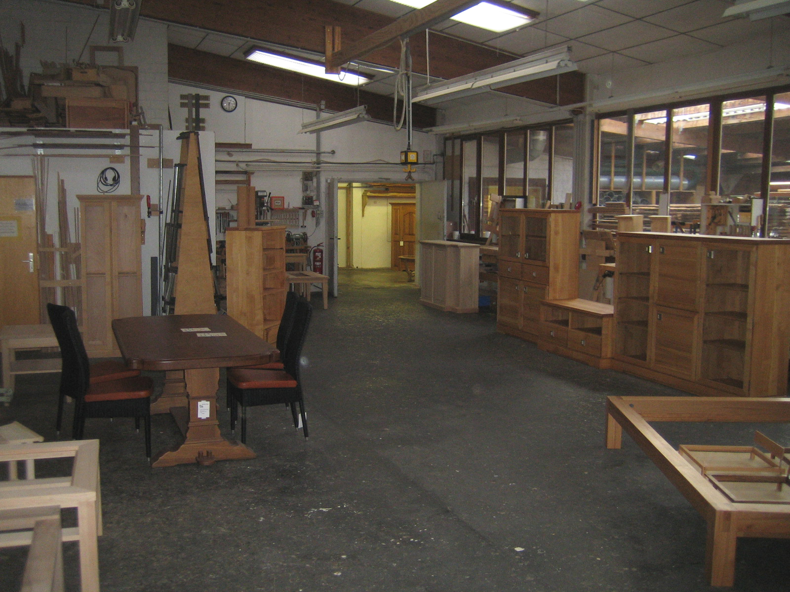 Furniture storage in Eschelbronn